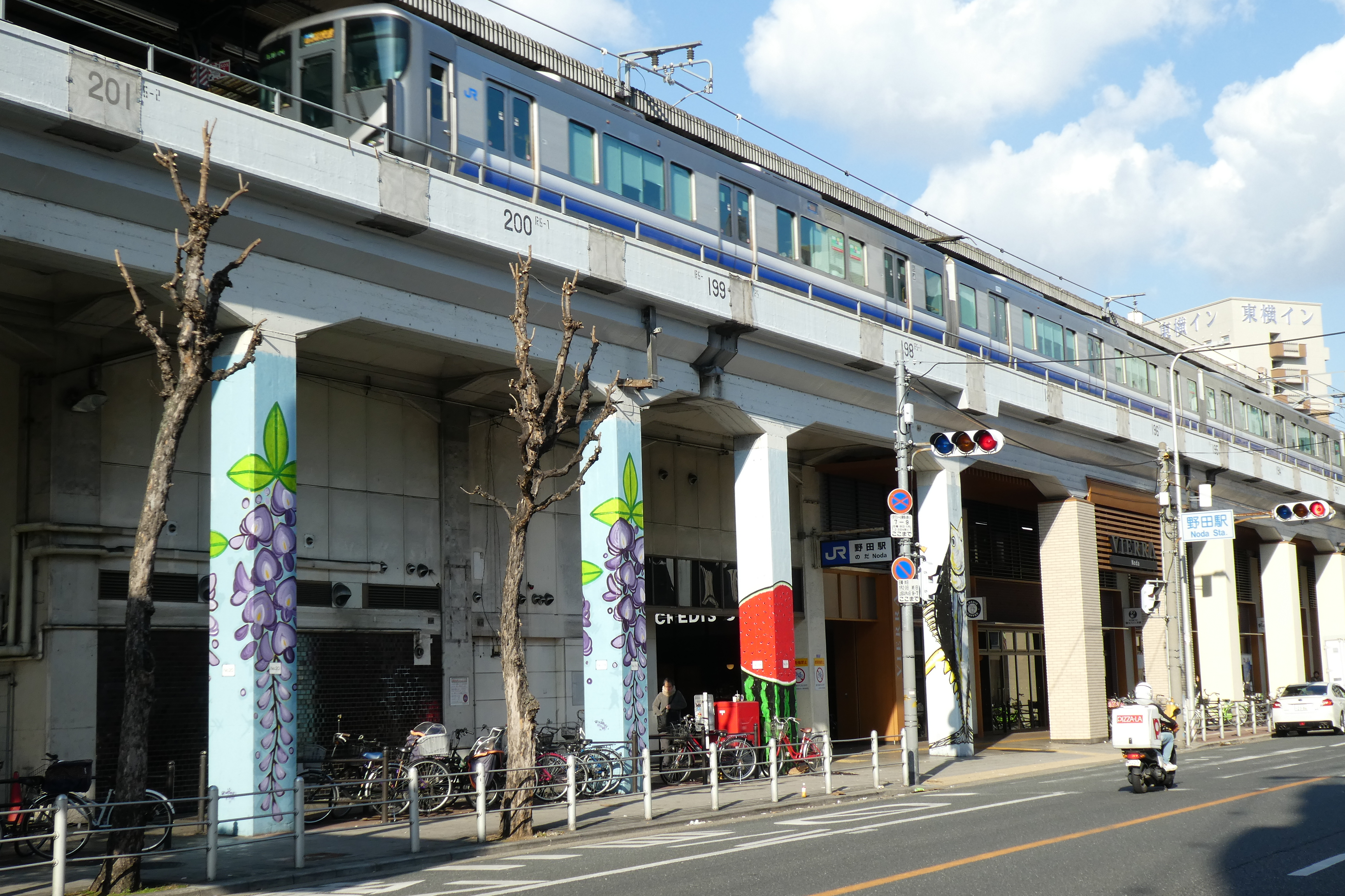 大阪環状線 野田駅 外観